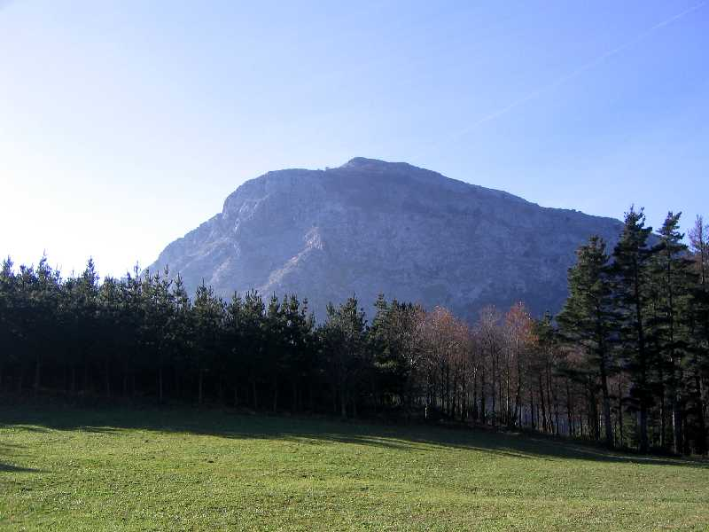 Vista del monte Untxilaitz, Vizcaya, País Vaco, España.